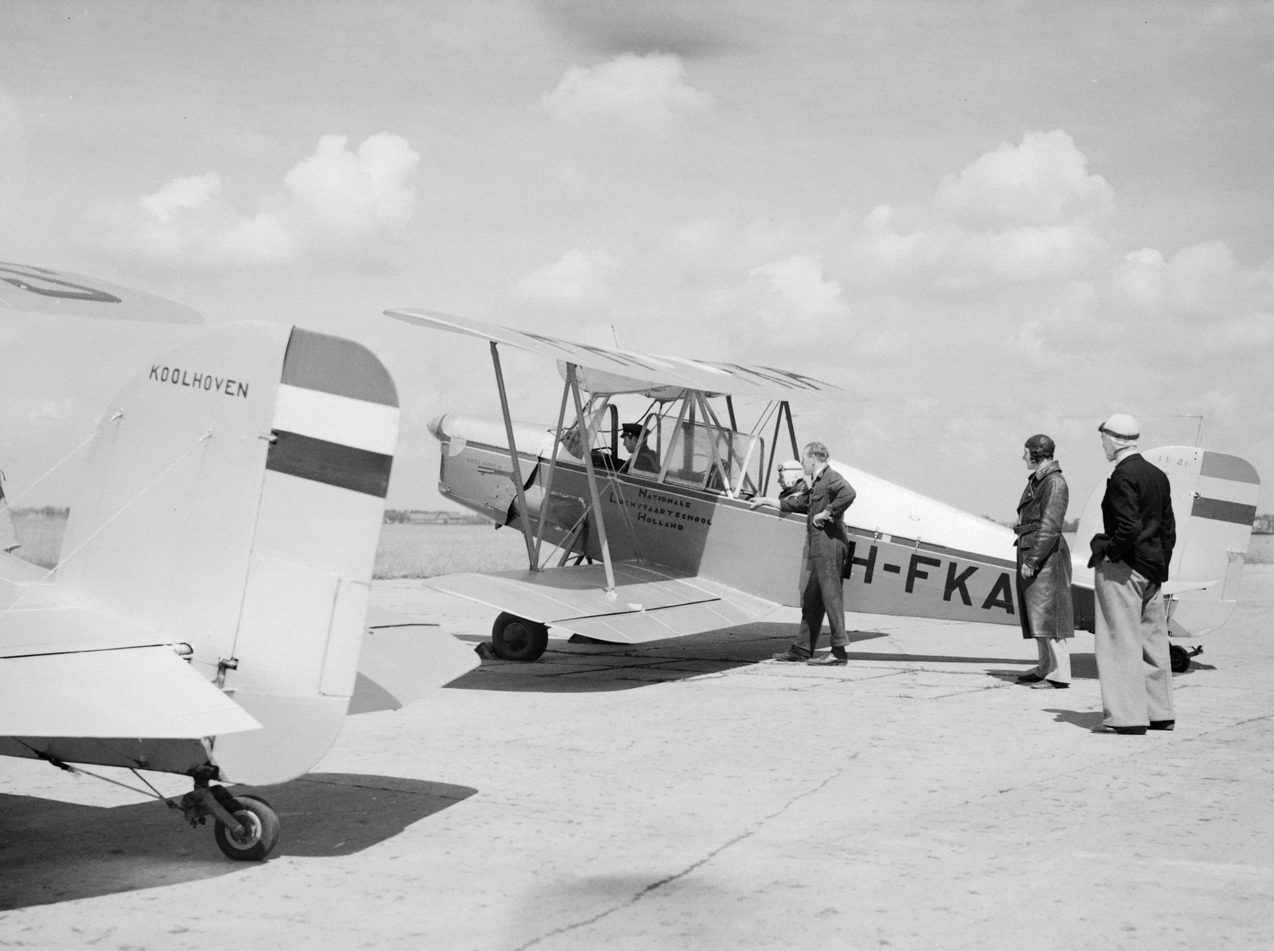 Collectie / Archief : Fotocollectie Van de Poll Reportage / Serie : Nationale Luchtvaartschool Holland Beschrijving : Een Koolhoven FK-46 lesvliegtuig bijgenaamd 'Koe of Koebeest' vanwege zijn dociele vlieggedrag van de Nationale Luchtvaartschool Holland te Amsterdam Schiphol met instructeur en adspirant-piloot, staand een mecanicien en twee leerling-piloten Annotatie : De Nationale Luchtvaart School Holland was gevestigd in Rotterdam Waalhaven en Amsterdam Schiphol Datum : 1933 Locatie : Amsterdam, Rotterdam Trefwoorden : leerlingen, leraren, monteurs, piloten, vliegopleidingen, vliegtuigen Persoonsnaam : Frits Koolhoven Fotograaf : Poll, Willem van de Auteursrechthebbende : Nationaal Archief Materiaalsoort : Negatief (zwart/wit) Nummer archiefinventaris : bekijk toegang 2.24.14.02 Bestanddeelnummer : 255-8624